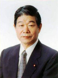 Minister Kiichi Inoue.